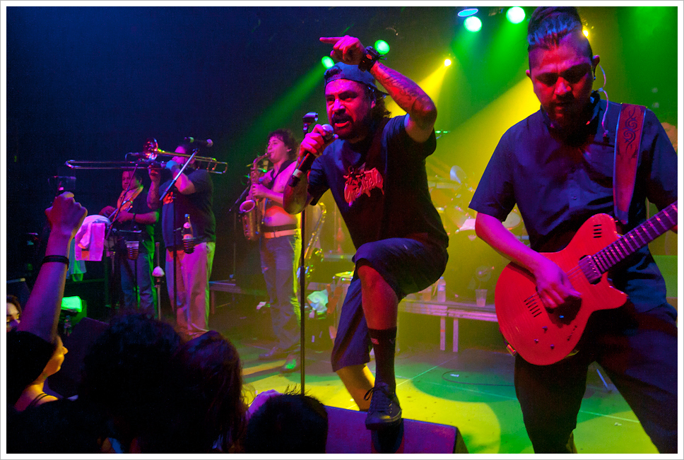 Panteón Rococo @ SO36